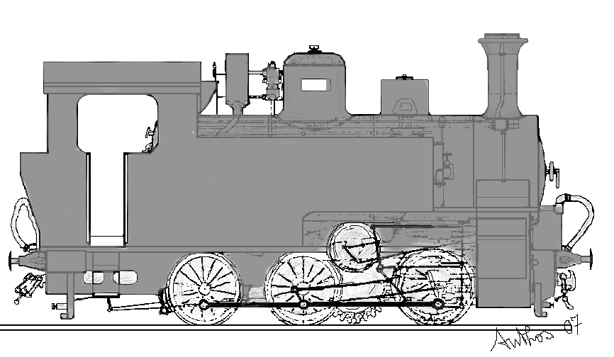 (english) Rack steam locomotive Group R.370 for narrow gauge (950 mm) of the Ferrovie dello Stato (FS) (deutsch) Zahnrad-Dampflokomotive Gruppe R.370 für Schmalspur (950 mm) der Ferrovie dello Stato (FS) (italiano) Locomotiva a vapore a cremagliera Gruppo R.370 a scartamento ridotto (950 mm) delle Ferrovie dello Stato (FS)